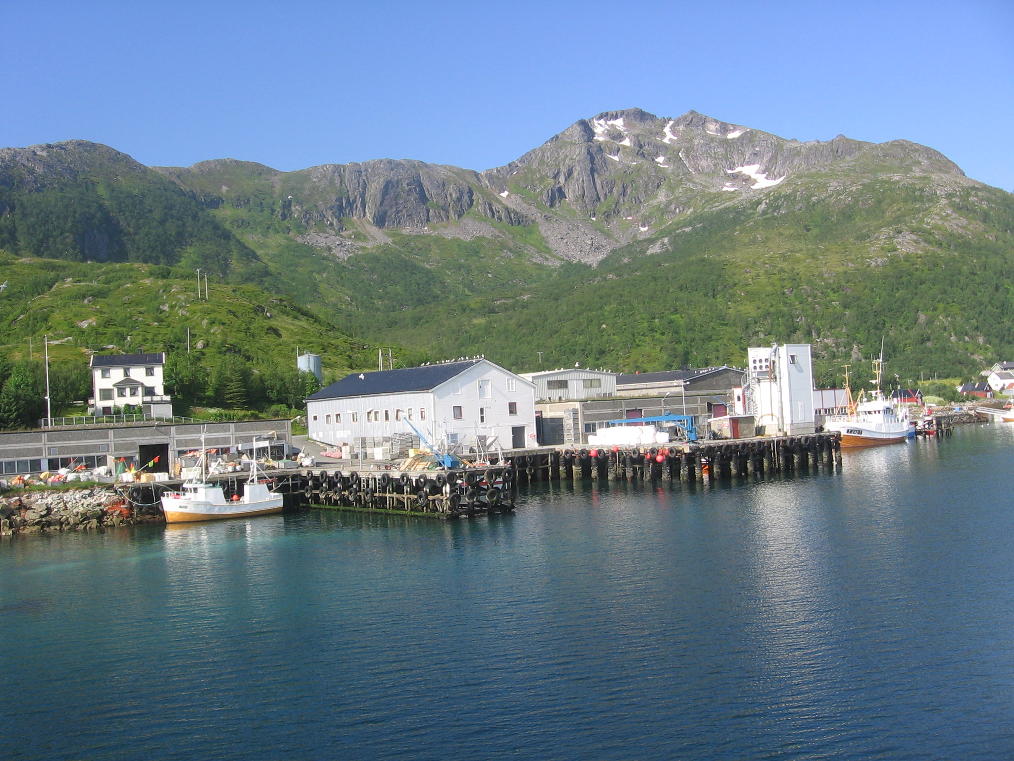 Vengsøya, Tromsø, Troms, Norway